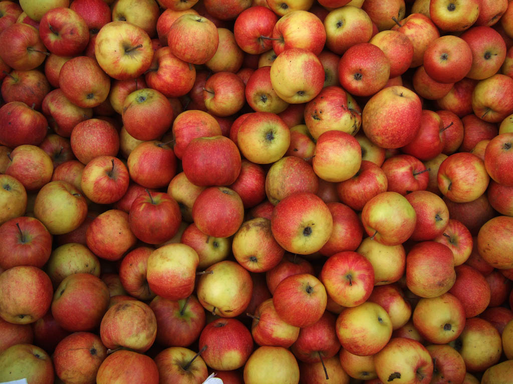 Jonagold